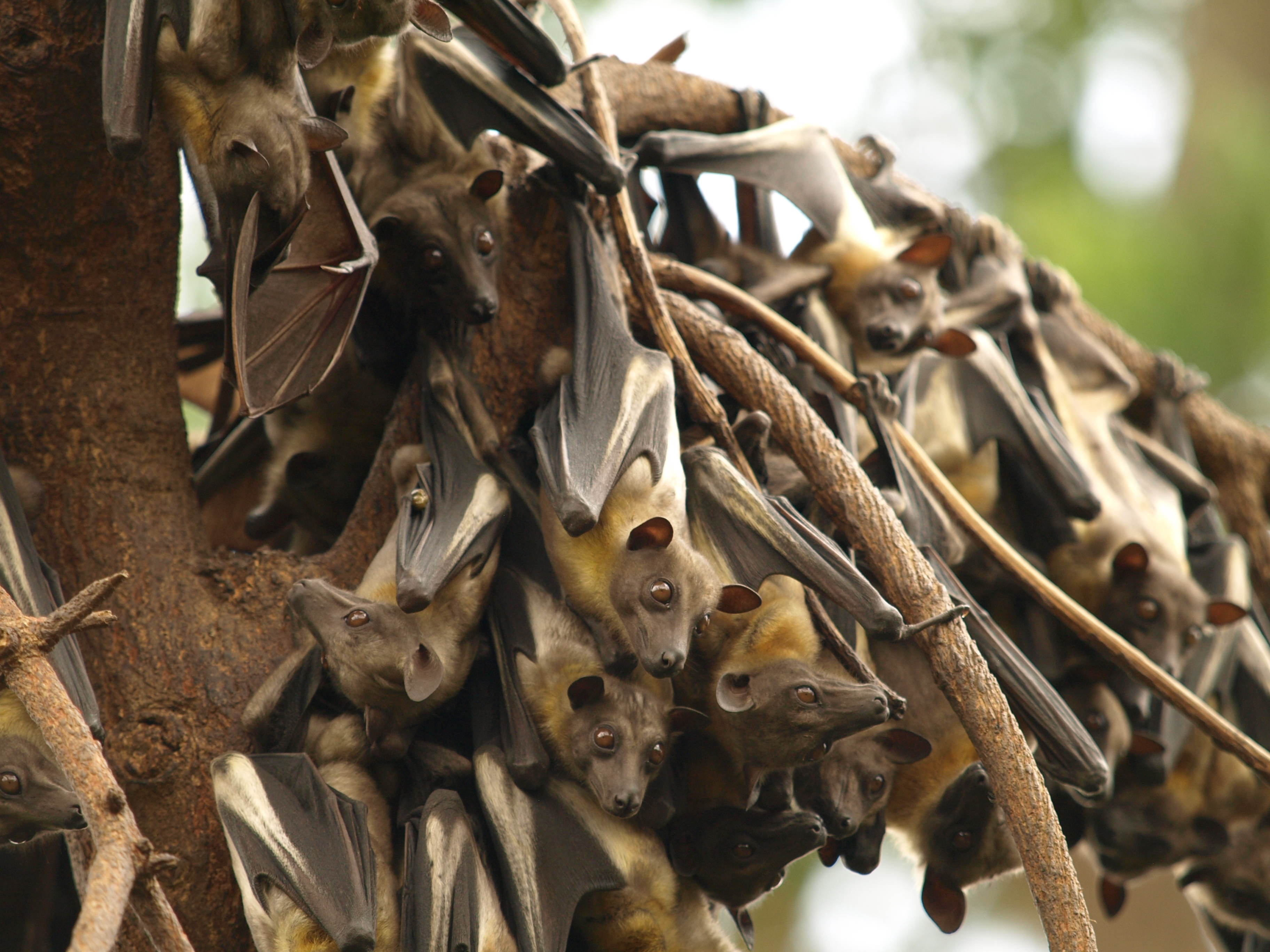 kolonia owocożernego Eidolon helvum Kenia 2015